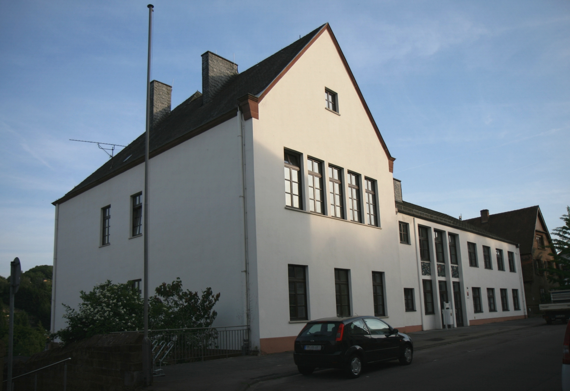 Gebäude des Amtsgerichts Saarburg in Saarburg.